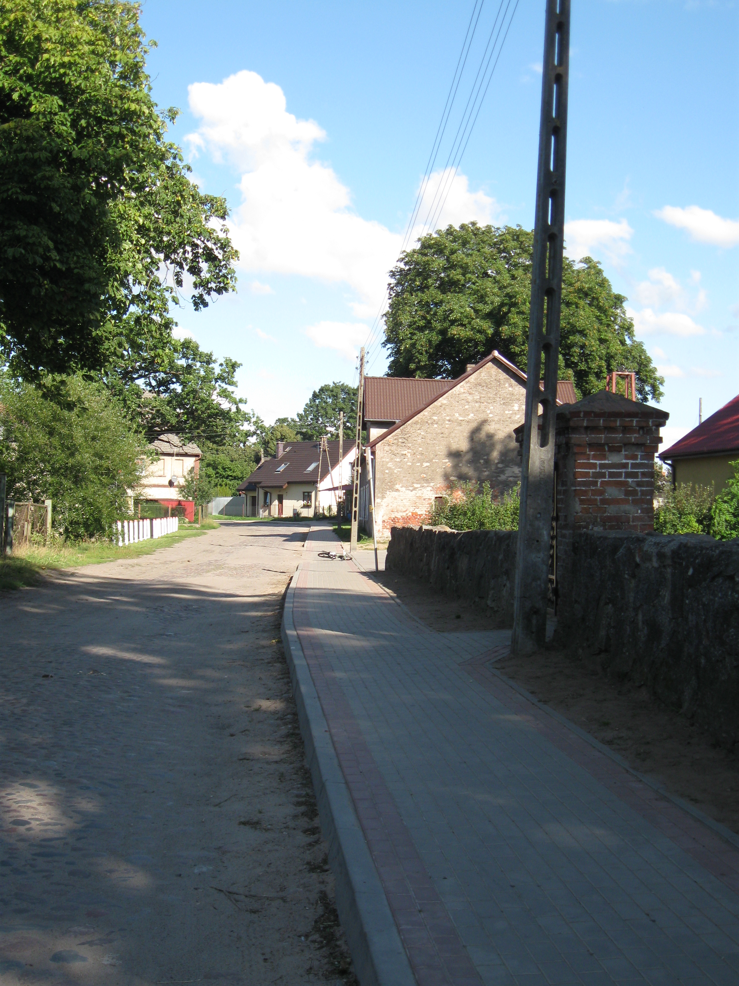 Bielikowo - droga w kierunku kościoła